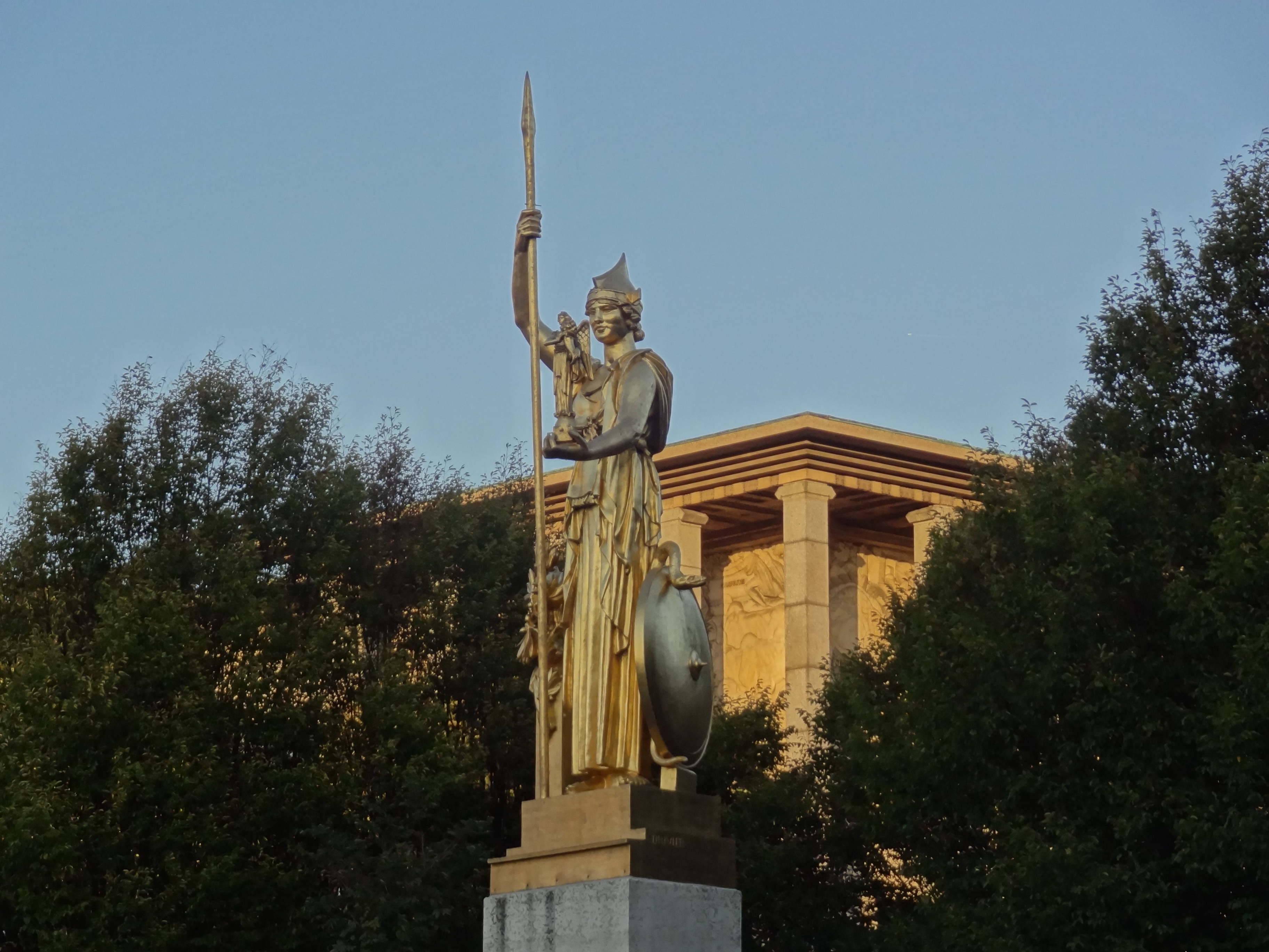 Palais de la Porte Dorée à Paris (12ème). This building is en partie classé, en partie inscrit au titre des Monuments Historiques. .